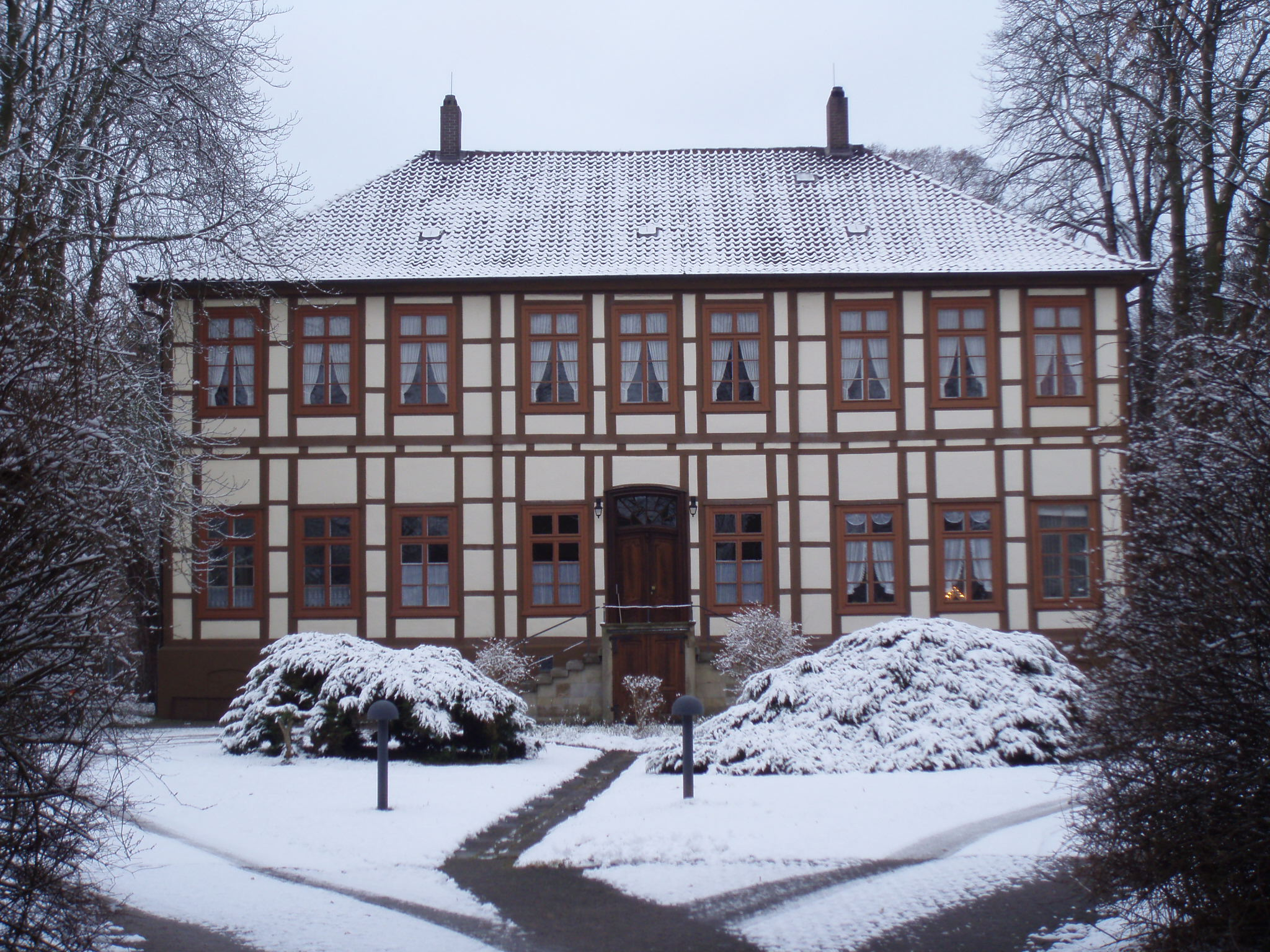 Das Schlemmsche Gut in Ahlten